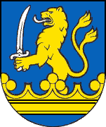 Erb mesta Vranov nad Topľou, Slovensko (HR: ?): V modrom štíte zo zlatej koruny vyrastá zlatý lev, ozbrojený striebornou šabľou.